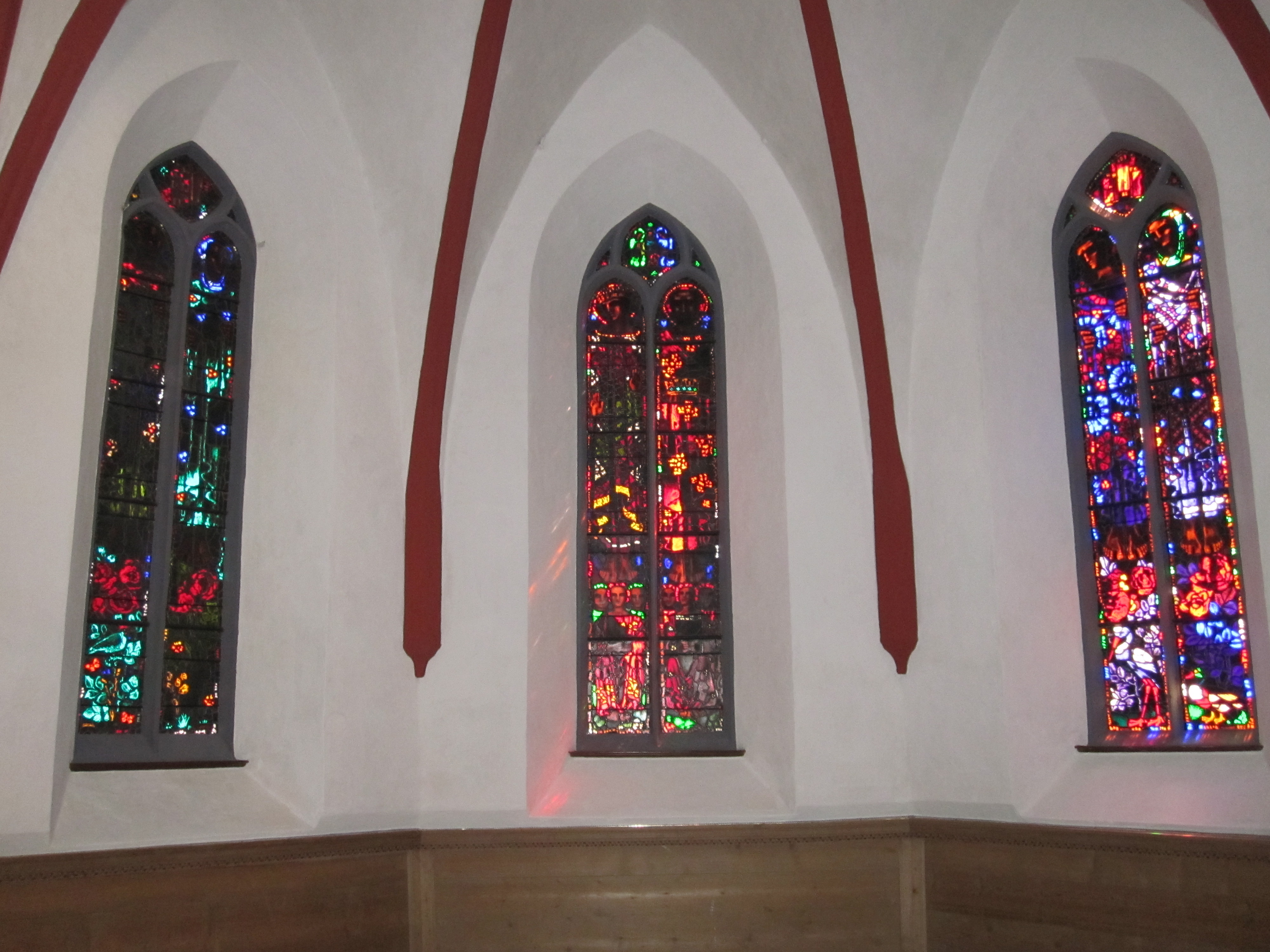 Glasfenster von Augusto Giacometti in der reformierten Kirche St. Johann in Davos (Kanton Graubünden)